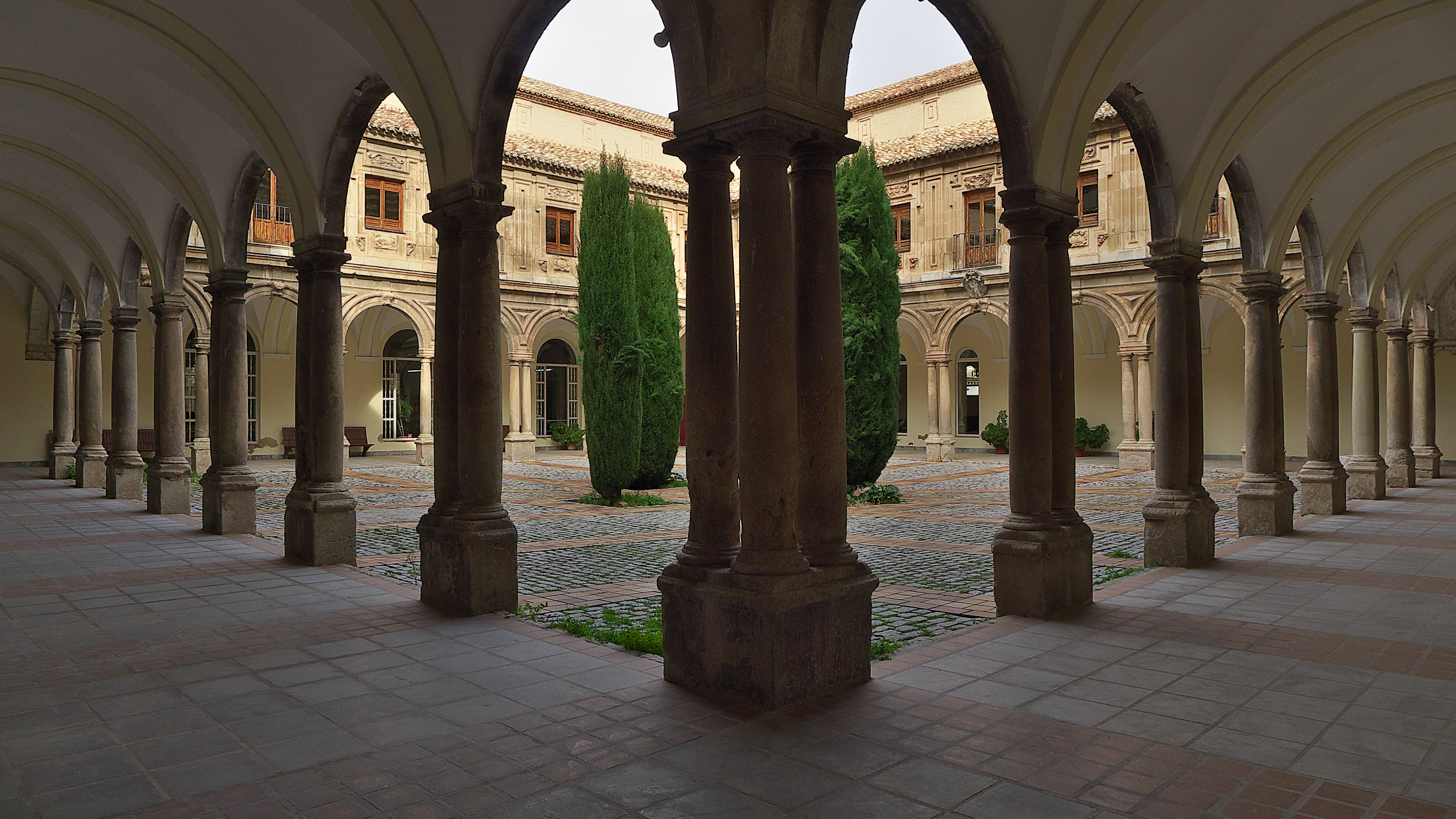 Claustro manierista del convento, atribuído a Eufrasio López de Rojas.